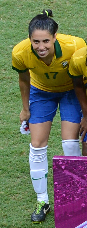 Selecionado feminino do Brasil, campeãs do Torneio Internacional de Brasília - 2013